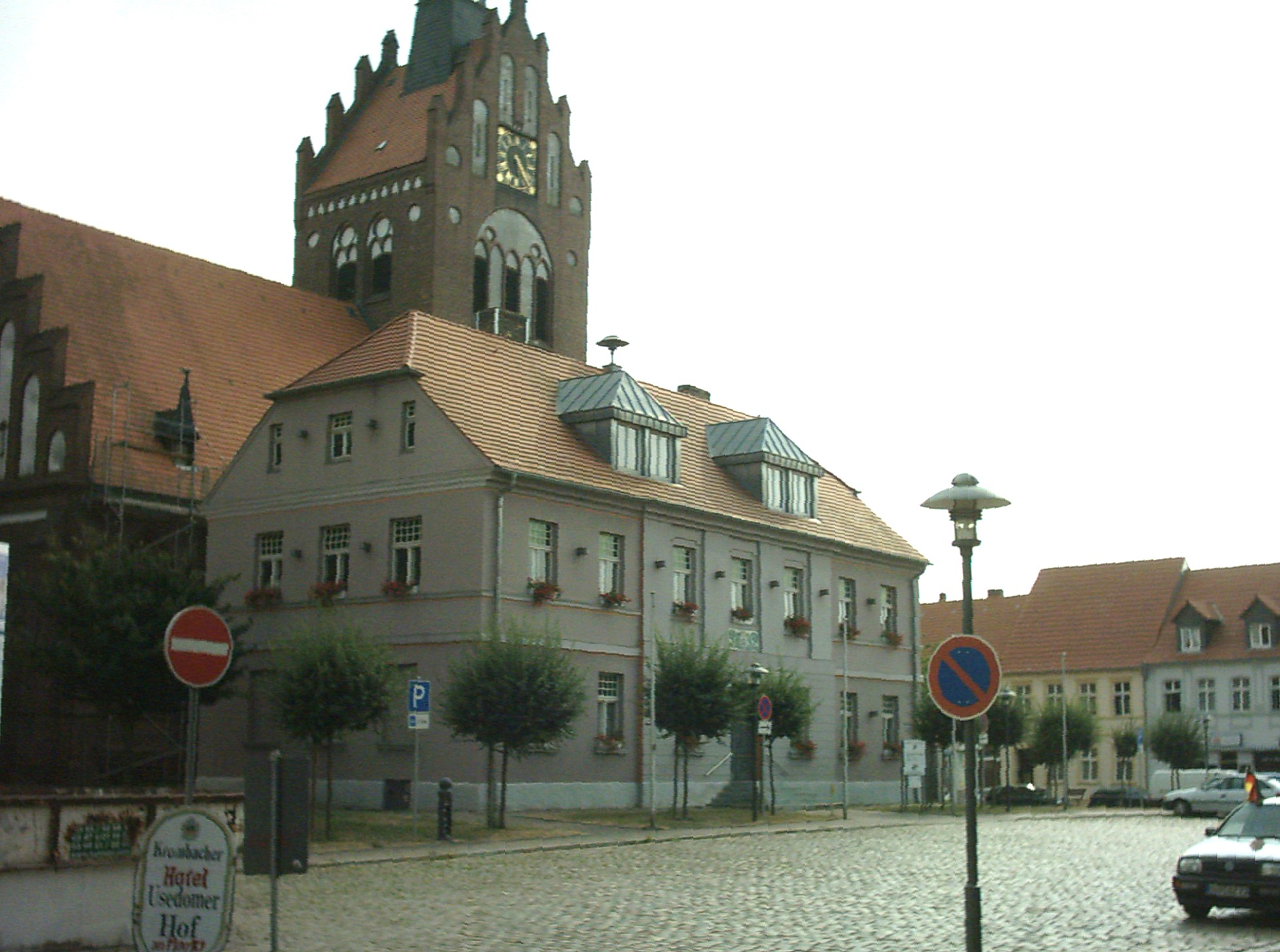 Stadt Usedom, Rathaus und Stadtkirche